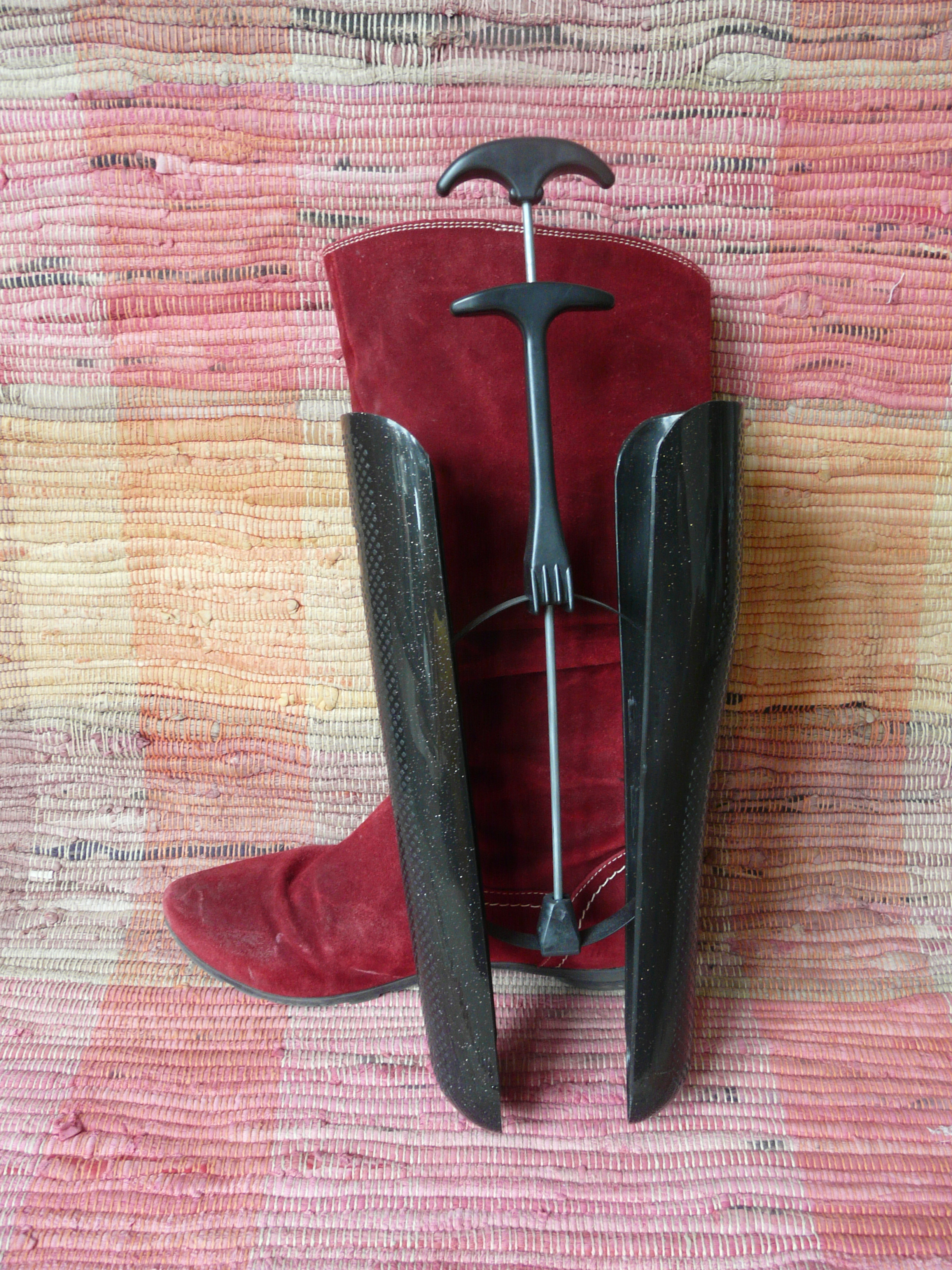 Bildinhalt: Roter Lederstiefel mit Schaftformer davor Aufnahmeort: Mannheim, Deutschland